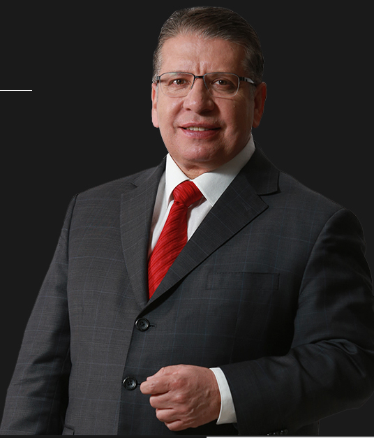 Foto oficial de Enrique Doger Guerrero 2018